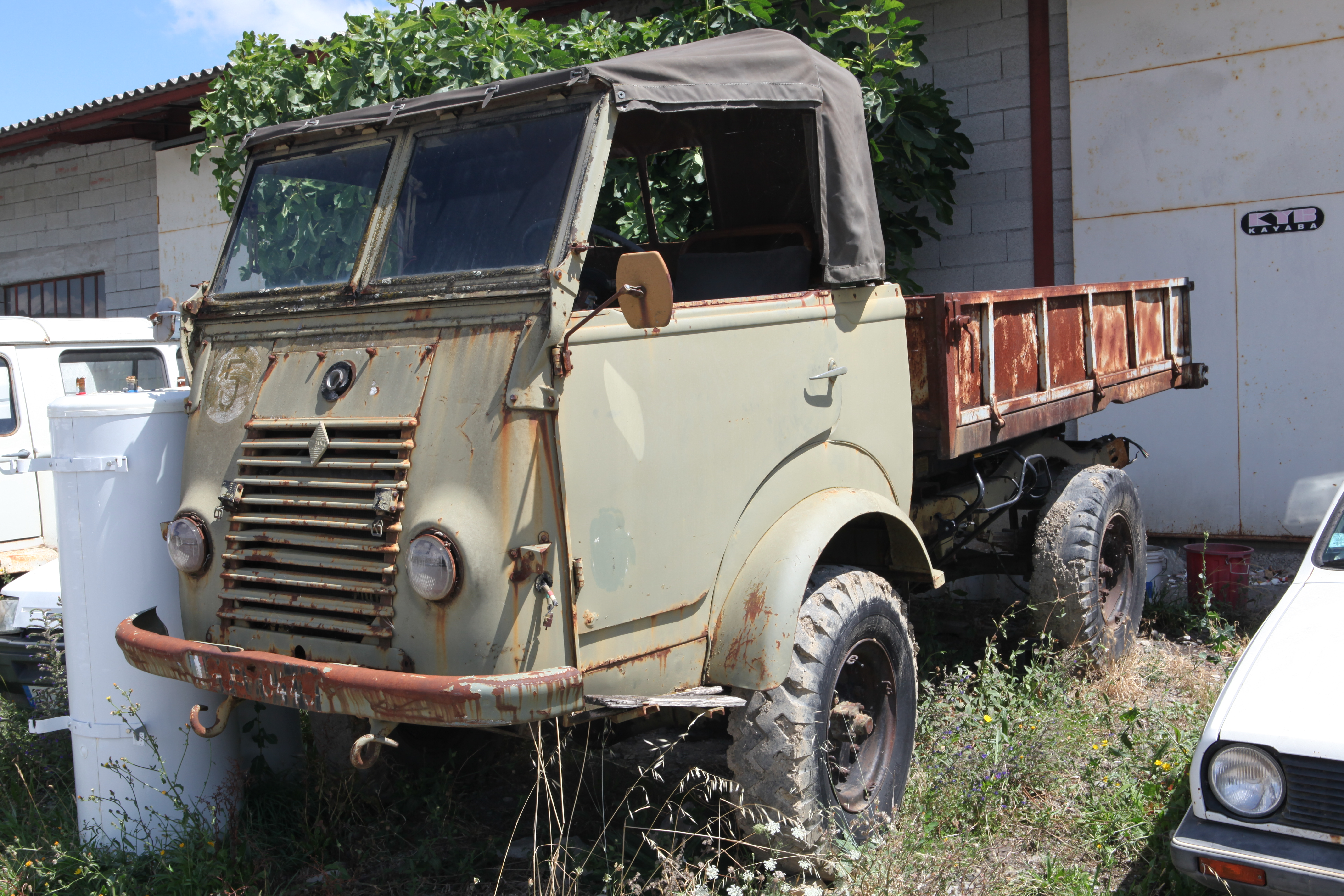 Renault Galion